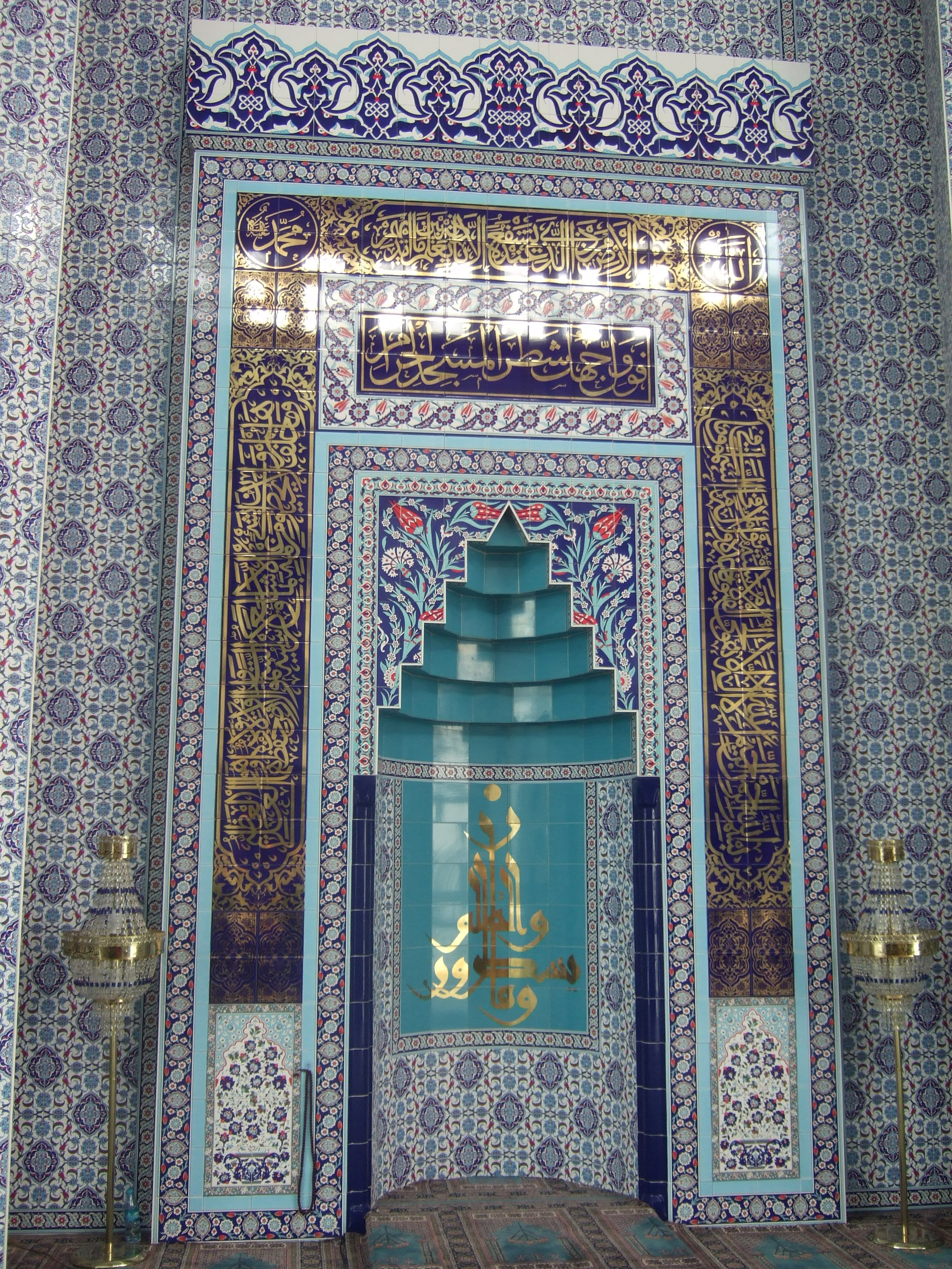 Mevlana Moschee in Kassel Gebetssaal Detail